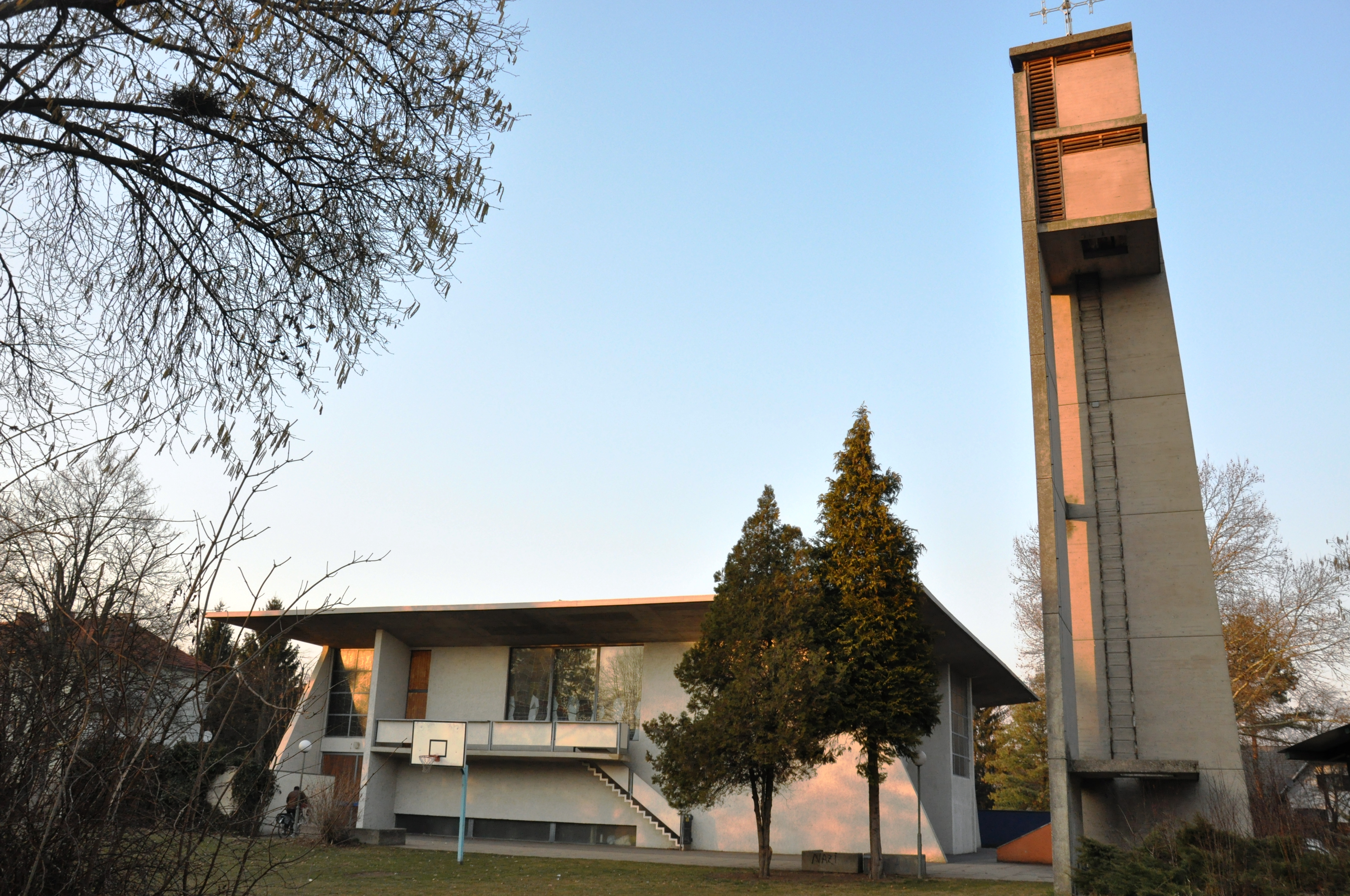 Kath. Pfarrkirche Christus der Auferstandene